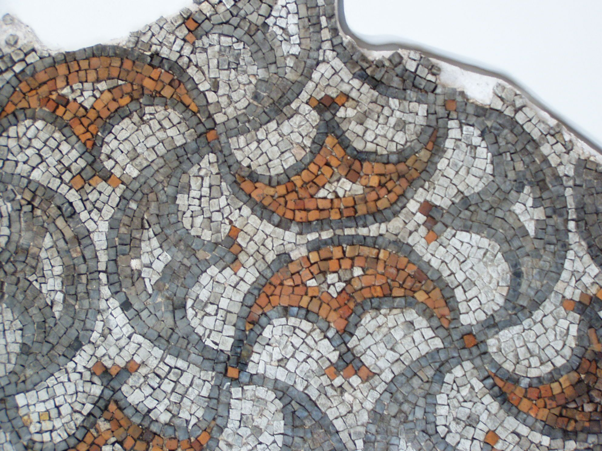 Hemmaberg, Carinthia. Westliche Doppelkirche, Gemeindekirche, Detail des Mosaiks aus dem Bereich der Priesterbank